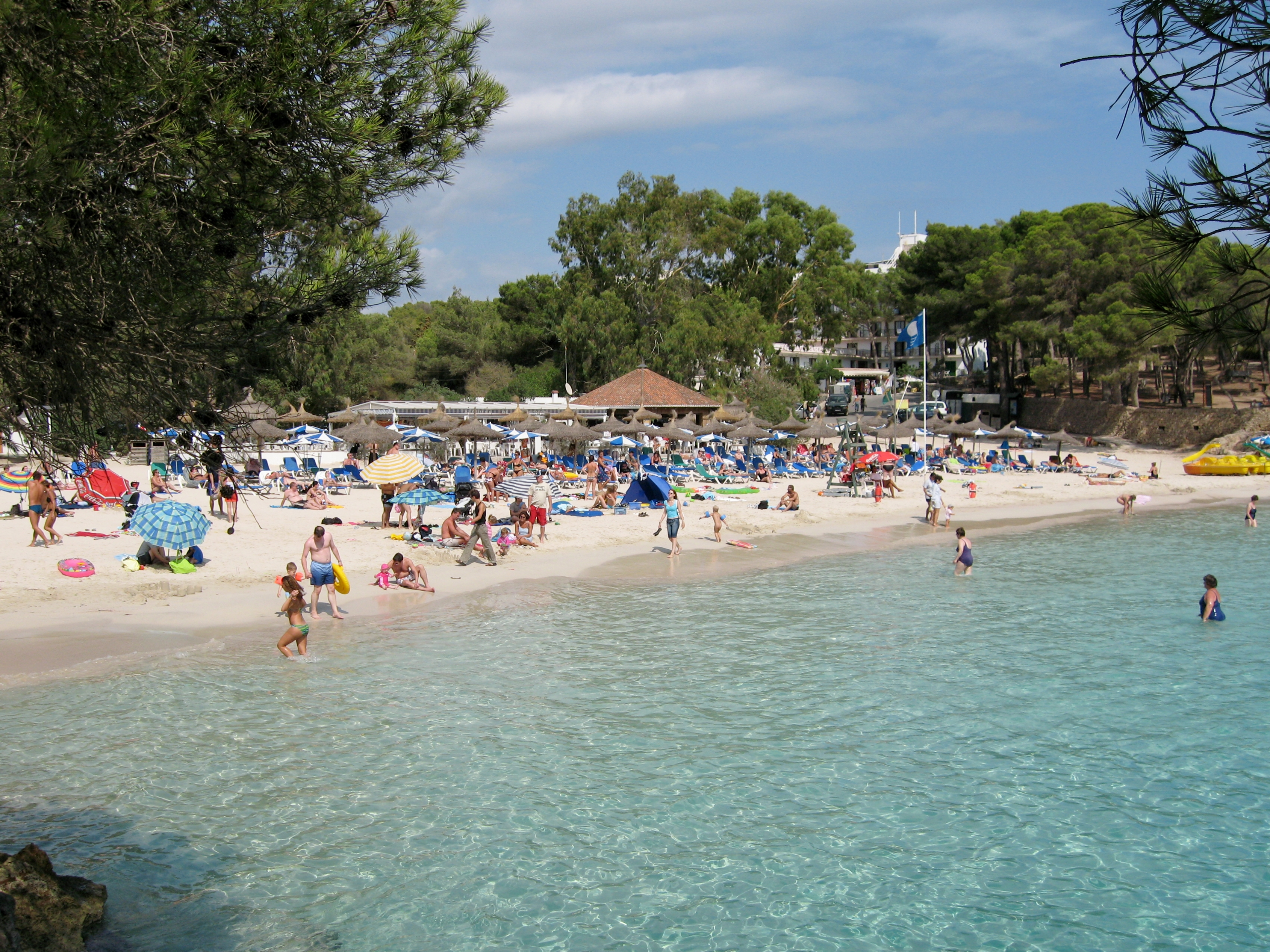 Ses Fonts de n’Alís, Strand an der Cala Mondragó, Gemeinde Santanyí, Mallorca, Spanien